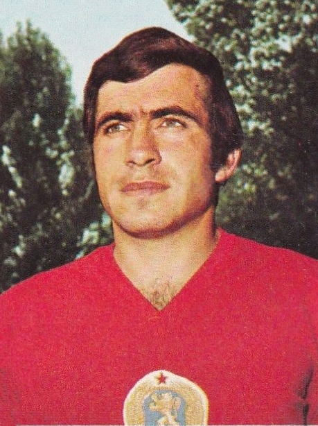 Figurina Calciatori Panini Munchen74 n°259 Stoianov